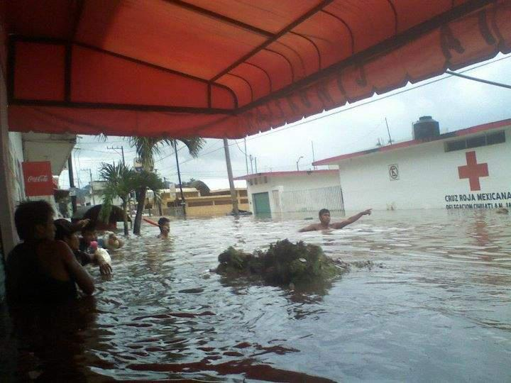 central de autobuses cihuatlan y cruz roja